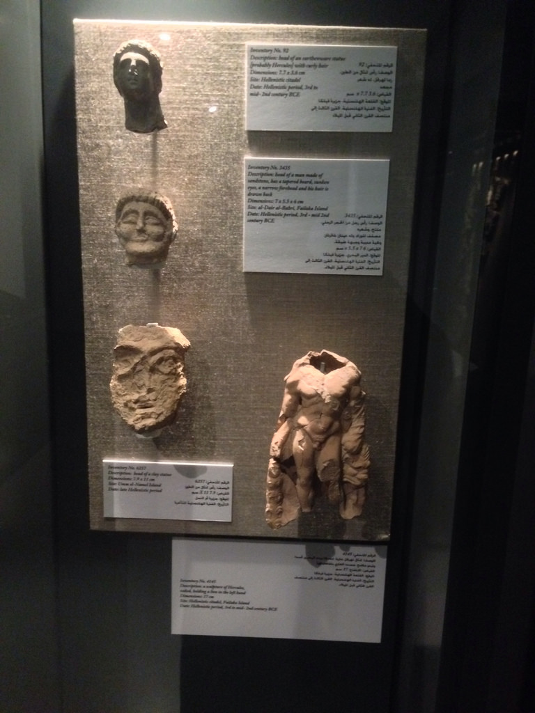 مجموعه تماثيل من الطين النضيج عثر عليها في الموقع الاغريقي بجزيرة فيلكا نرى فيها راس الاسكندر الاكبر الشاب وجسد تمثال هرقل مفقود الراس وشخصيات اخرى